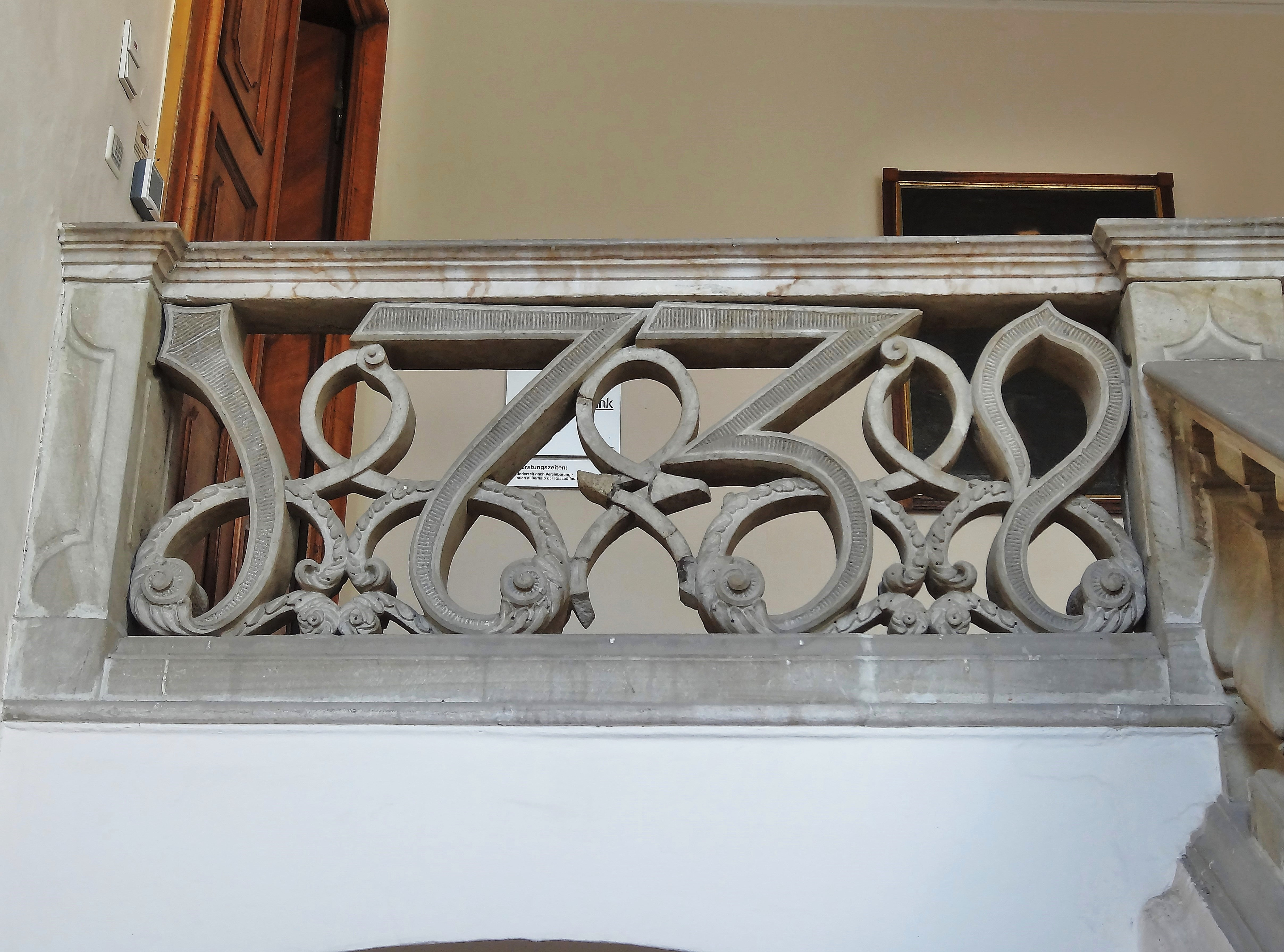 Palais Goess (Klagenfurt), Steinbalustrade im Stiegenhaus mit Jahreszahl 1739